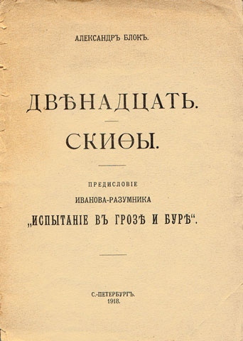 Двенадцать. Скифы